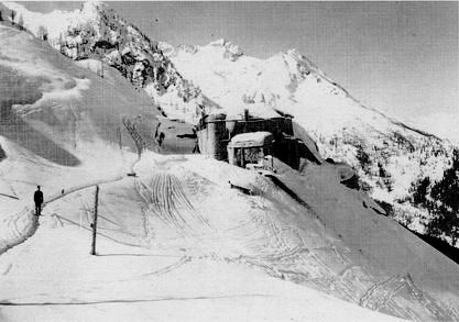 Forte Presanella in inverno